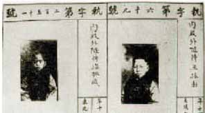 Hình do người truyền lên chụp từ Tạp chí nghiên cứu và phát triển số 3.(51).2005. Ảnh miêu tả: Thái giám đời Thanh, Trung quốc.